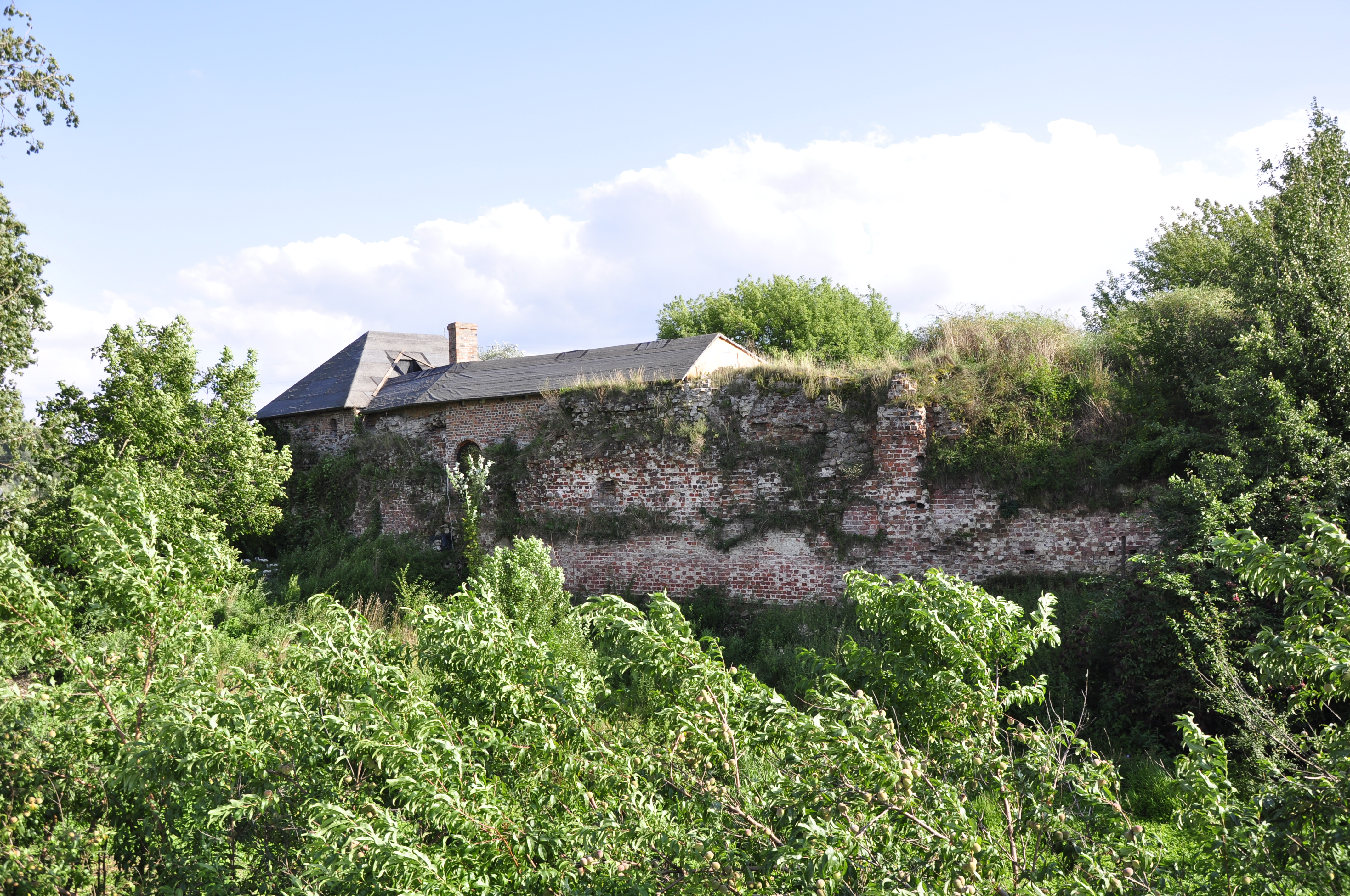 Lowicz Burg